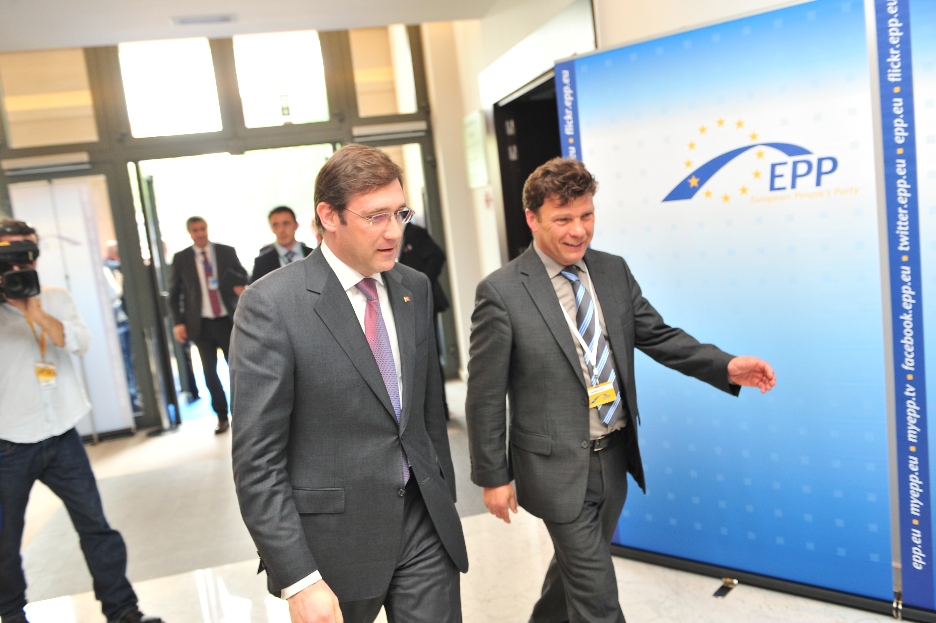 BEN_6454